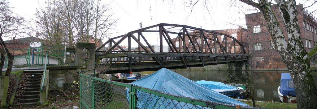 Wyspa Jaskółcza - most, Szczecin